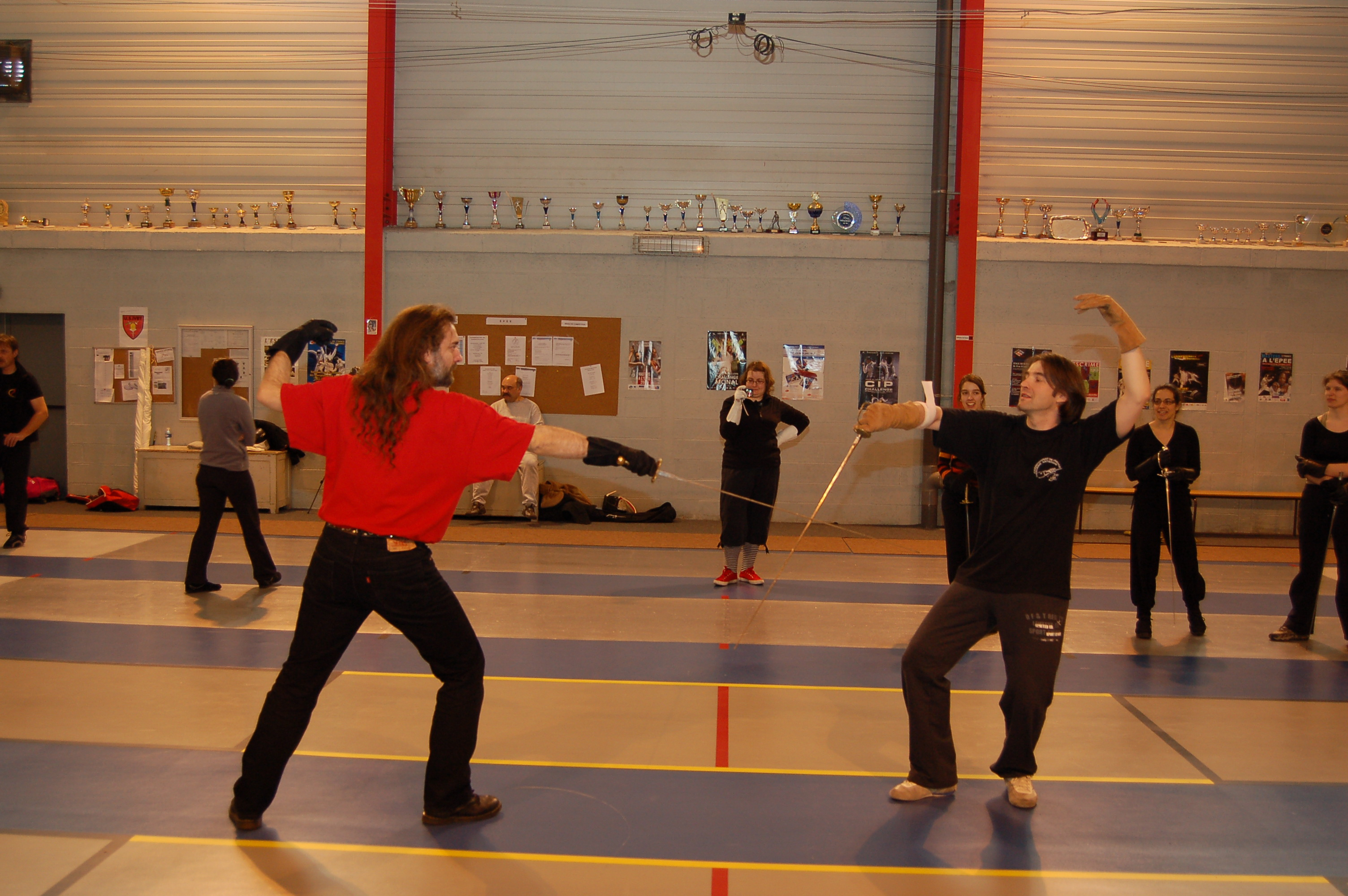 cours d'escrime artistique (Ivry 2009)